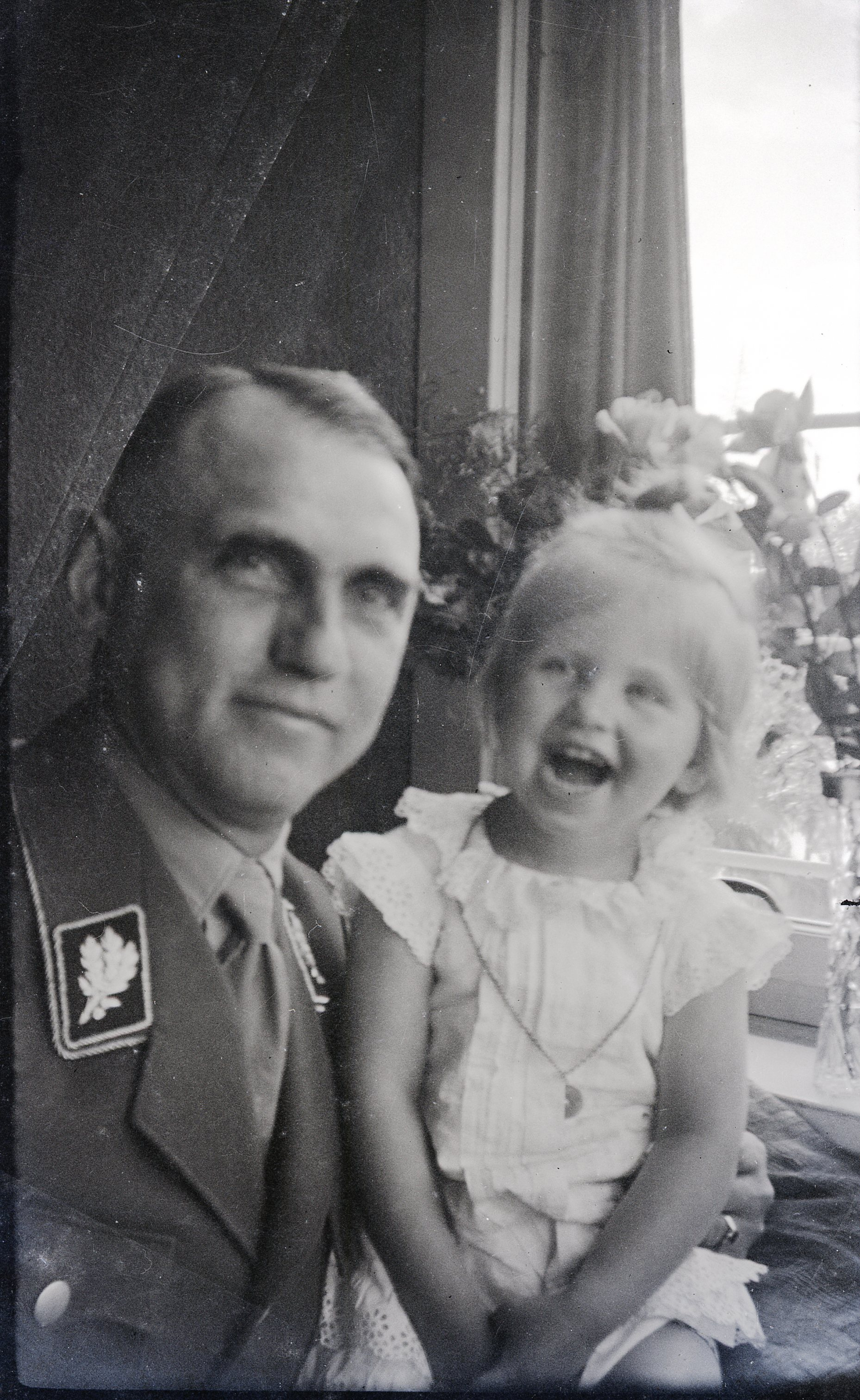 Adolf Kob, Königl. Sächs. Major i. Generalstab, amtierender Gruppenleiter SA Mitte, mit seiner ältesten Enkelin (1936)